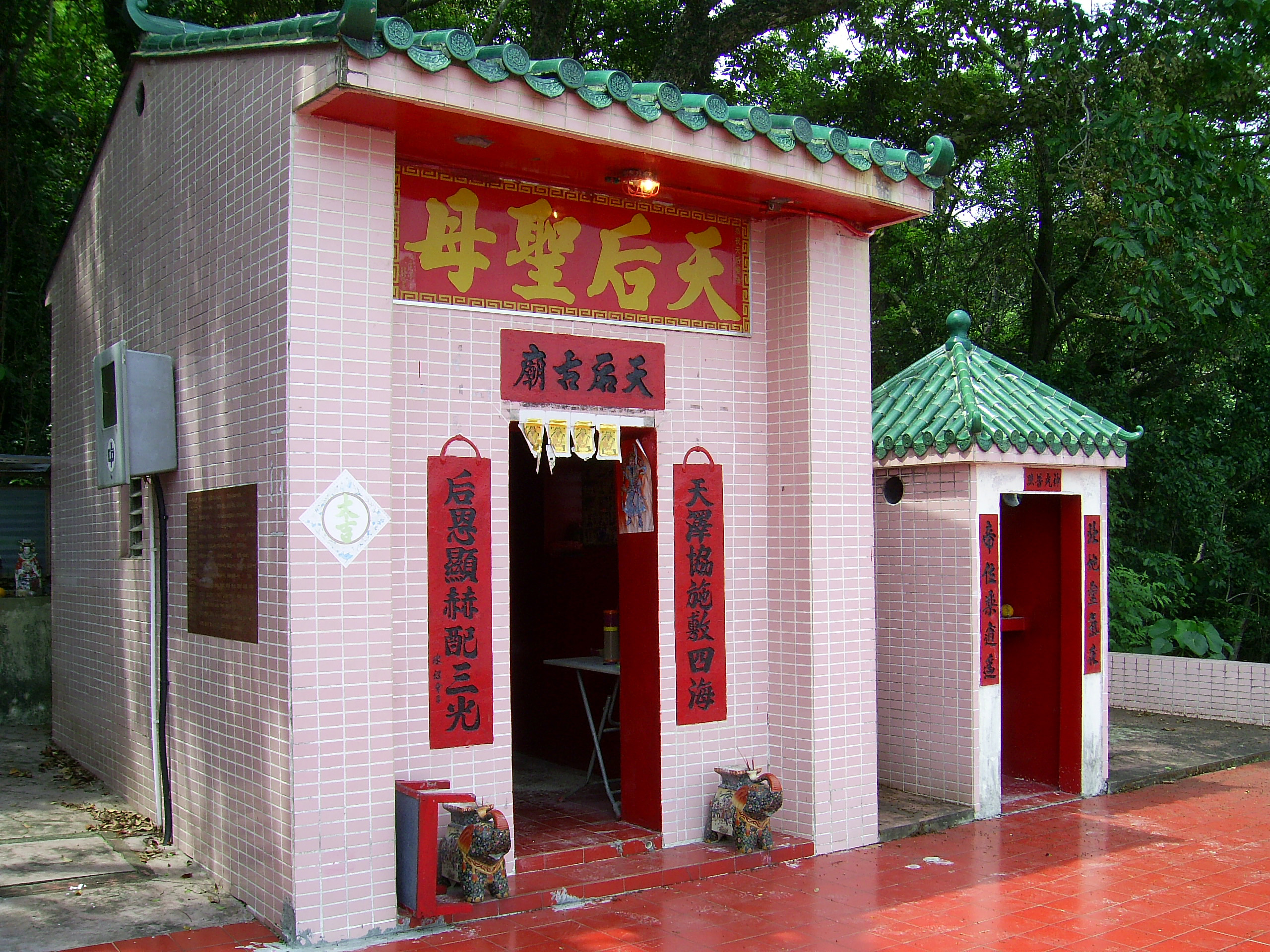 中文（香港）: 黃麖地天后古廟